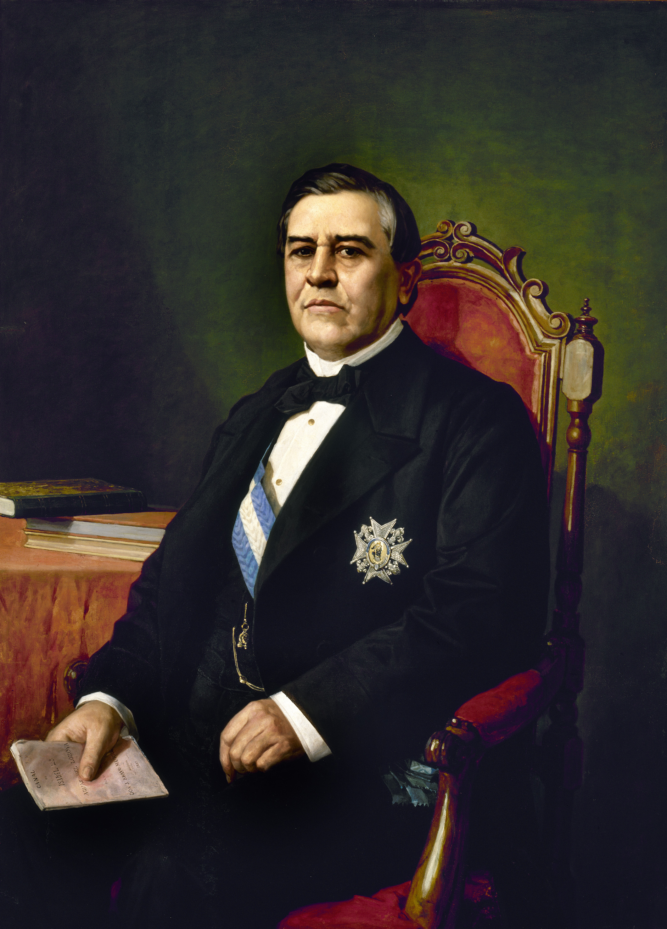 Retrato del político español Juan Bravo Murillo (1803-1873).